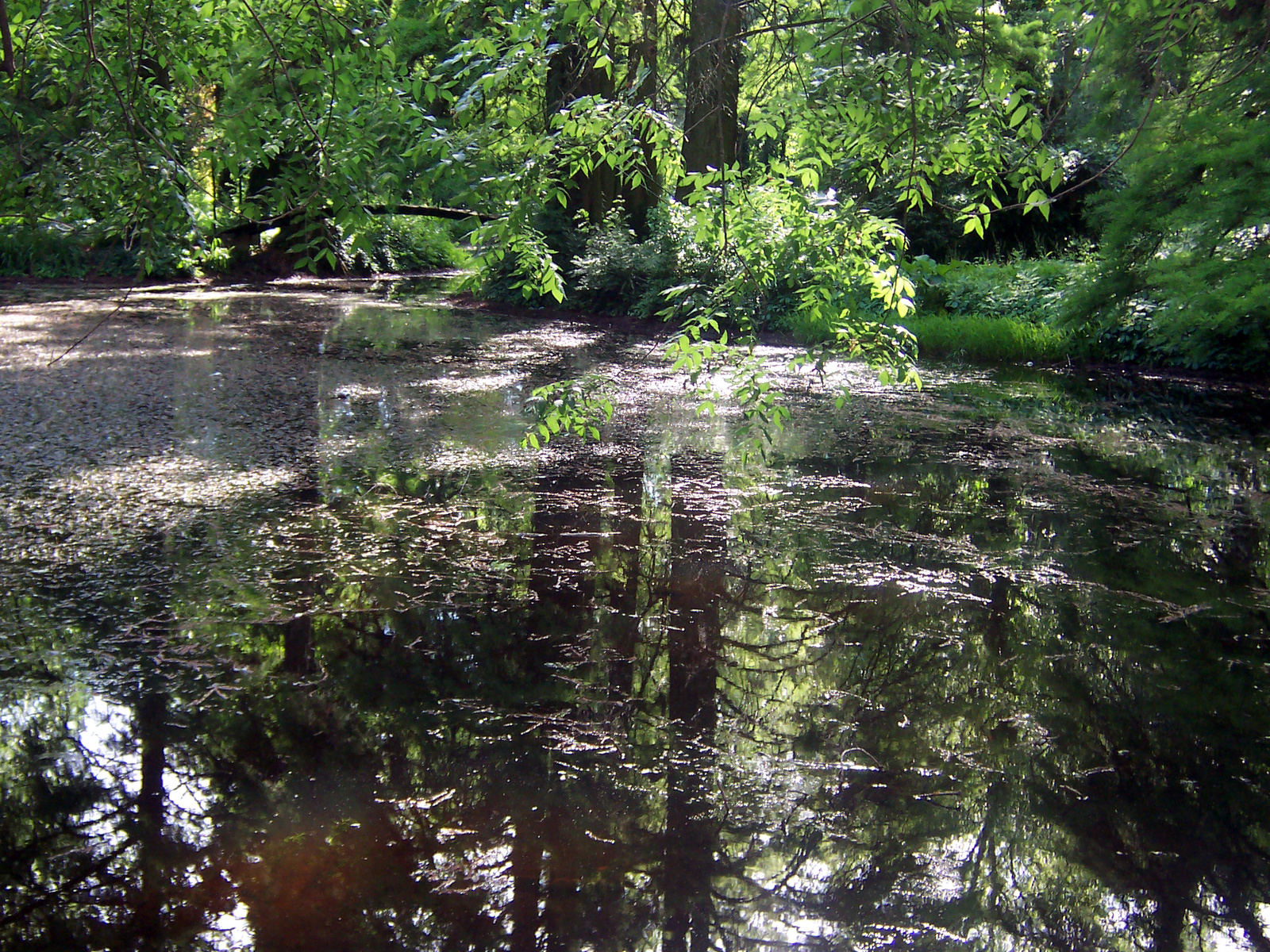 Wenckheim-kastély (Szabadkígyós, Tangazdaság 22-23.) This is a photo of a monument in Hungary, Identifier: 2579